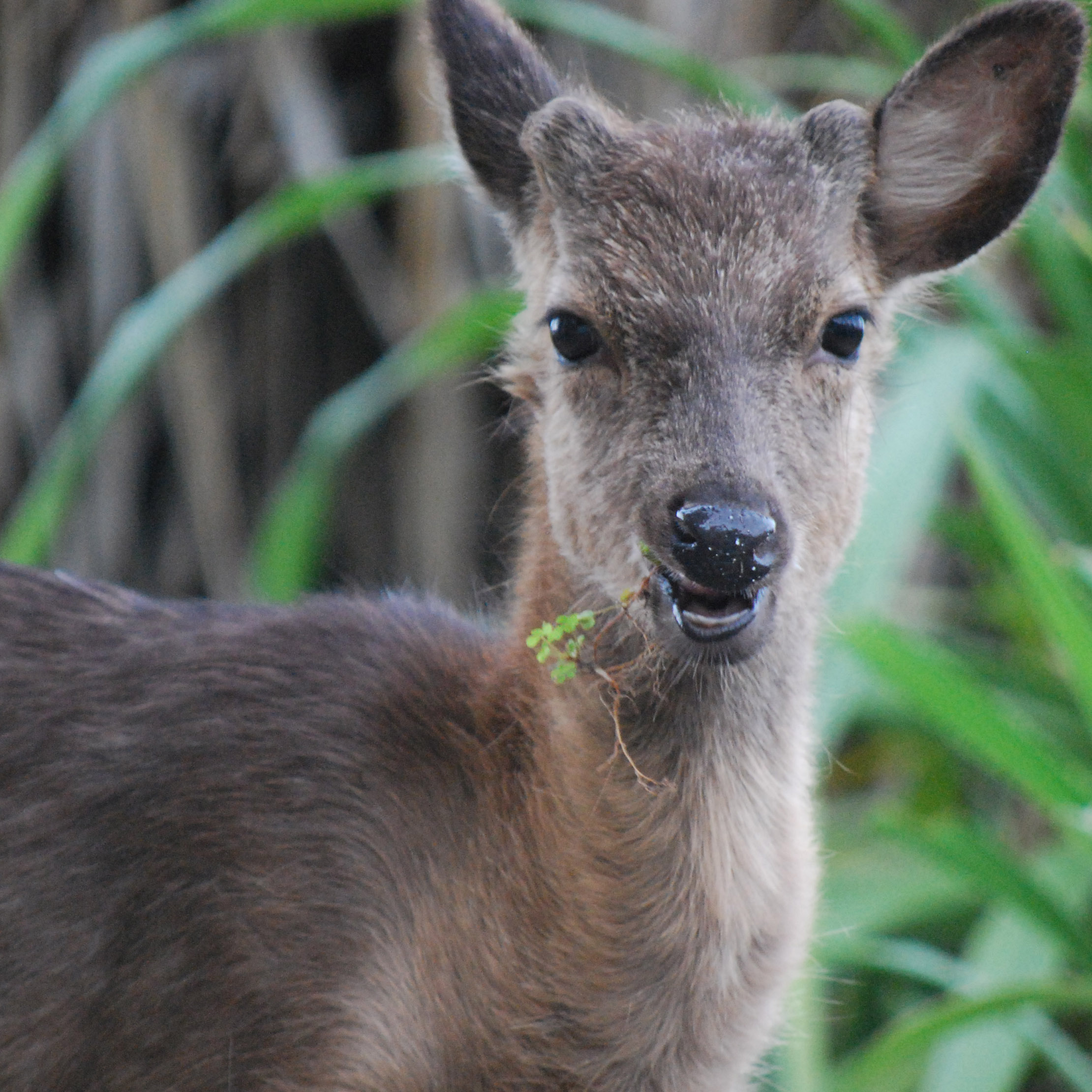 ケラマ島ビーチ近くにてGWに撮影 撮影日 五月一日 撮影者 natsu 撮影場所 阿嘉島